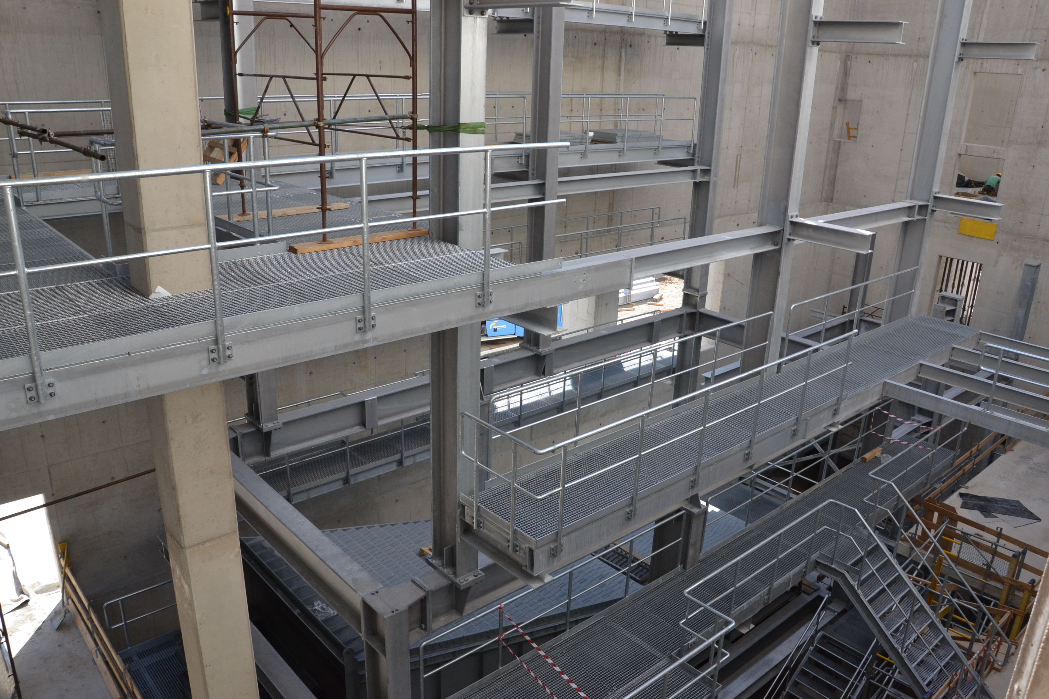 Stahlbau mit Gitterrosten während der Errichtungsphase für einen Biomassedampfkessel für das Biomasseheizkraftwerk Steyr